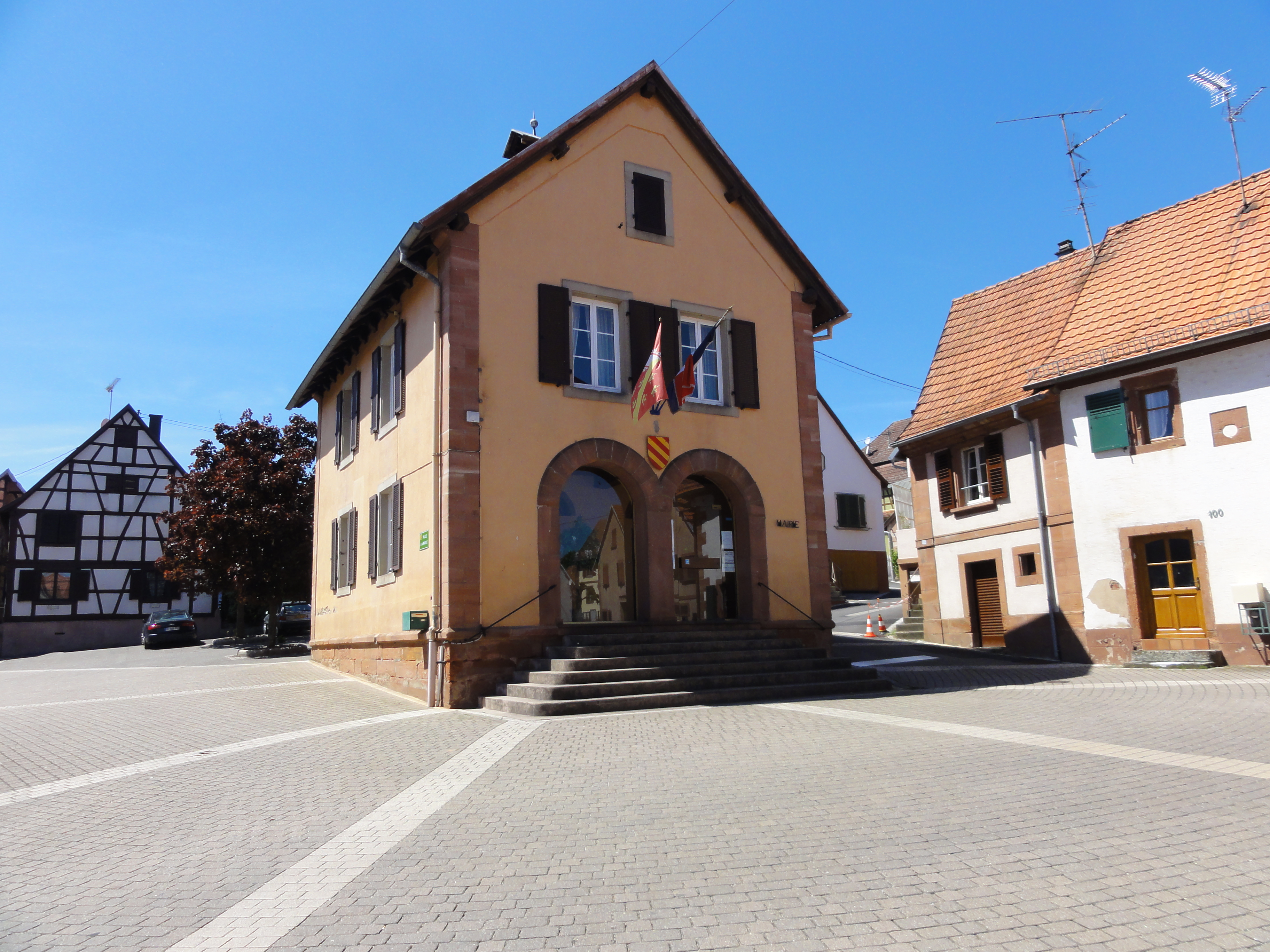 Alsace, Bas-Rhin, Weinbourg, Mairie (1847), place de la mairie. .